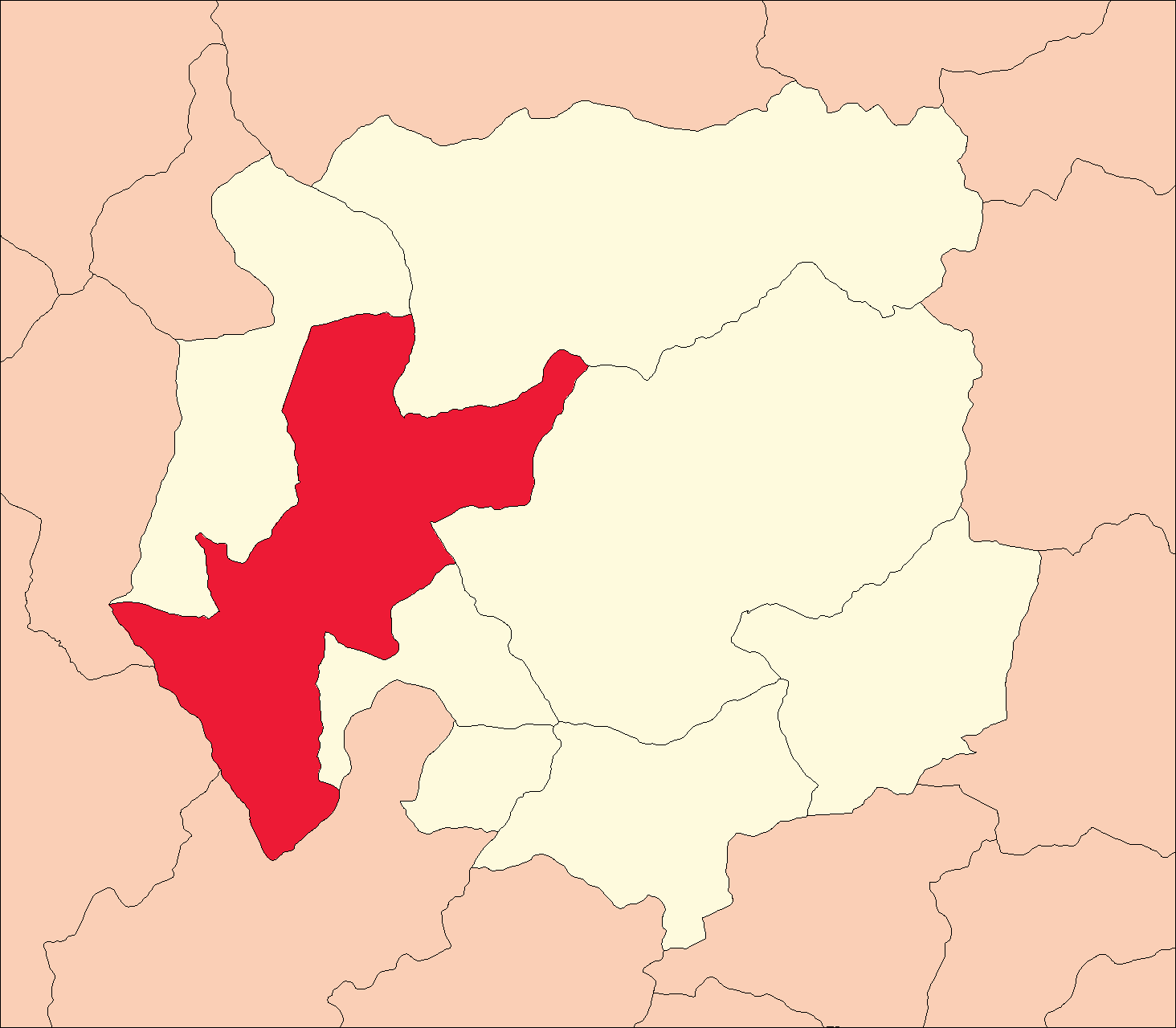 Ubicación del distrito de Obas.